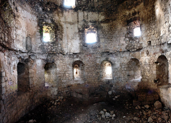 Kula Norinska-unutrašnjost